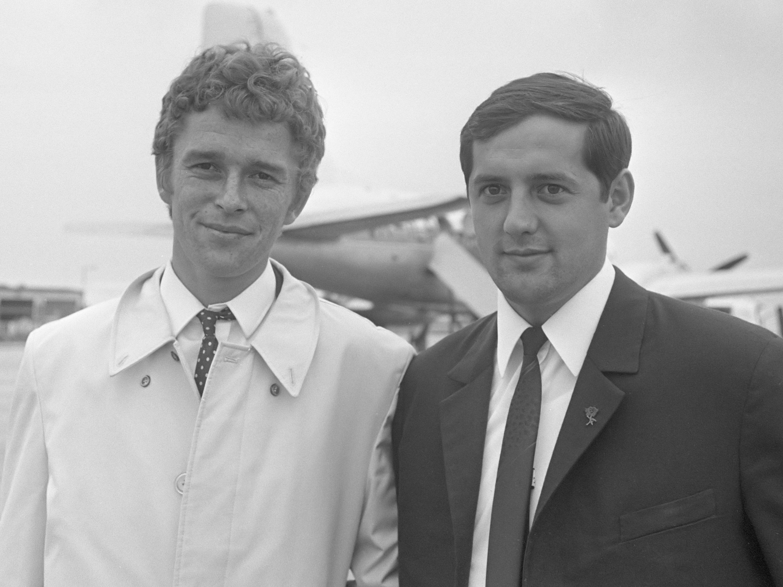 Roemeens elftal Ut Arad arriveert op Zestienhoven voor wedstrijd tegen Feijenoord om Europacup I ; links Domide rechts Georghe Gornea , keeper, kop 14 september 1970